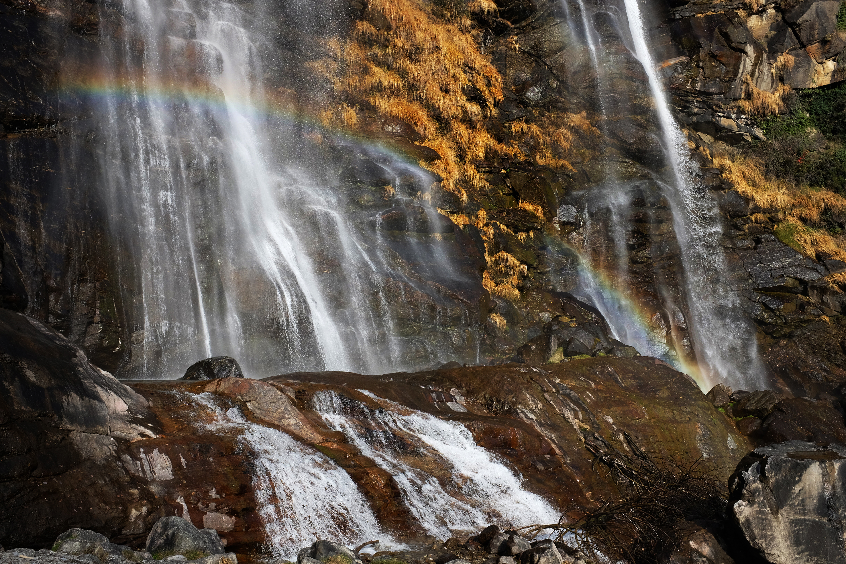 Monumento naturale delle Cascate dell'Acqua Fraggia (Q47508663)